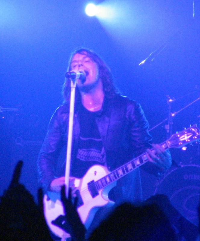 Foto scattata dal vivo da Daniele Purrone al concerto di Milano del 2004